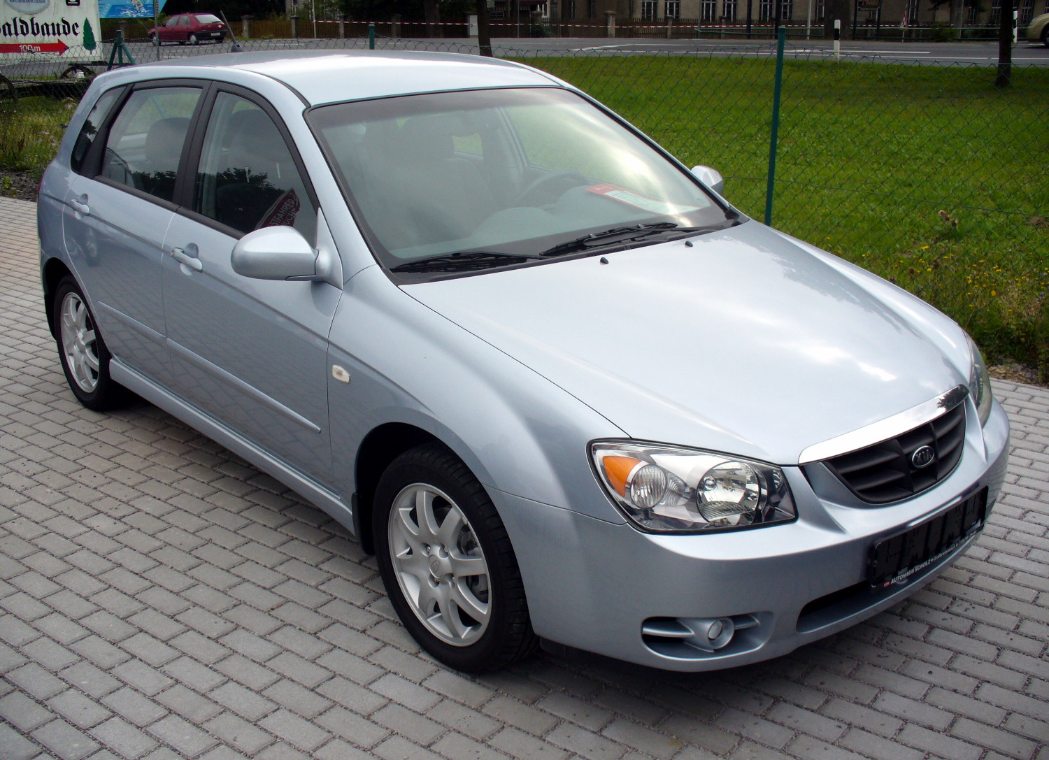 Kia Cerato